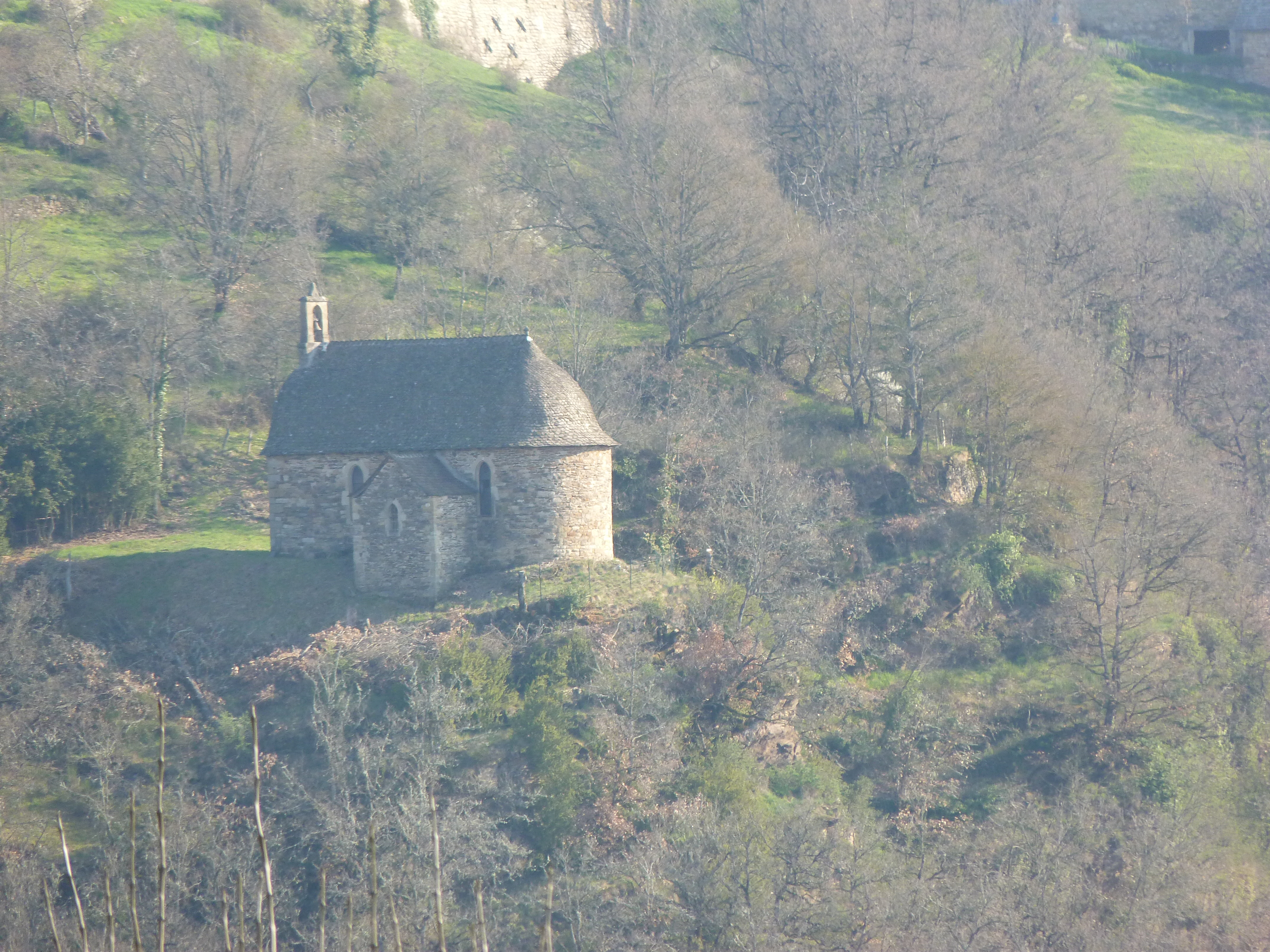 chapelle st jean de bedel, montjezieu commune de la canourgue